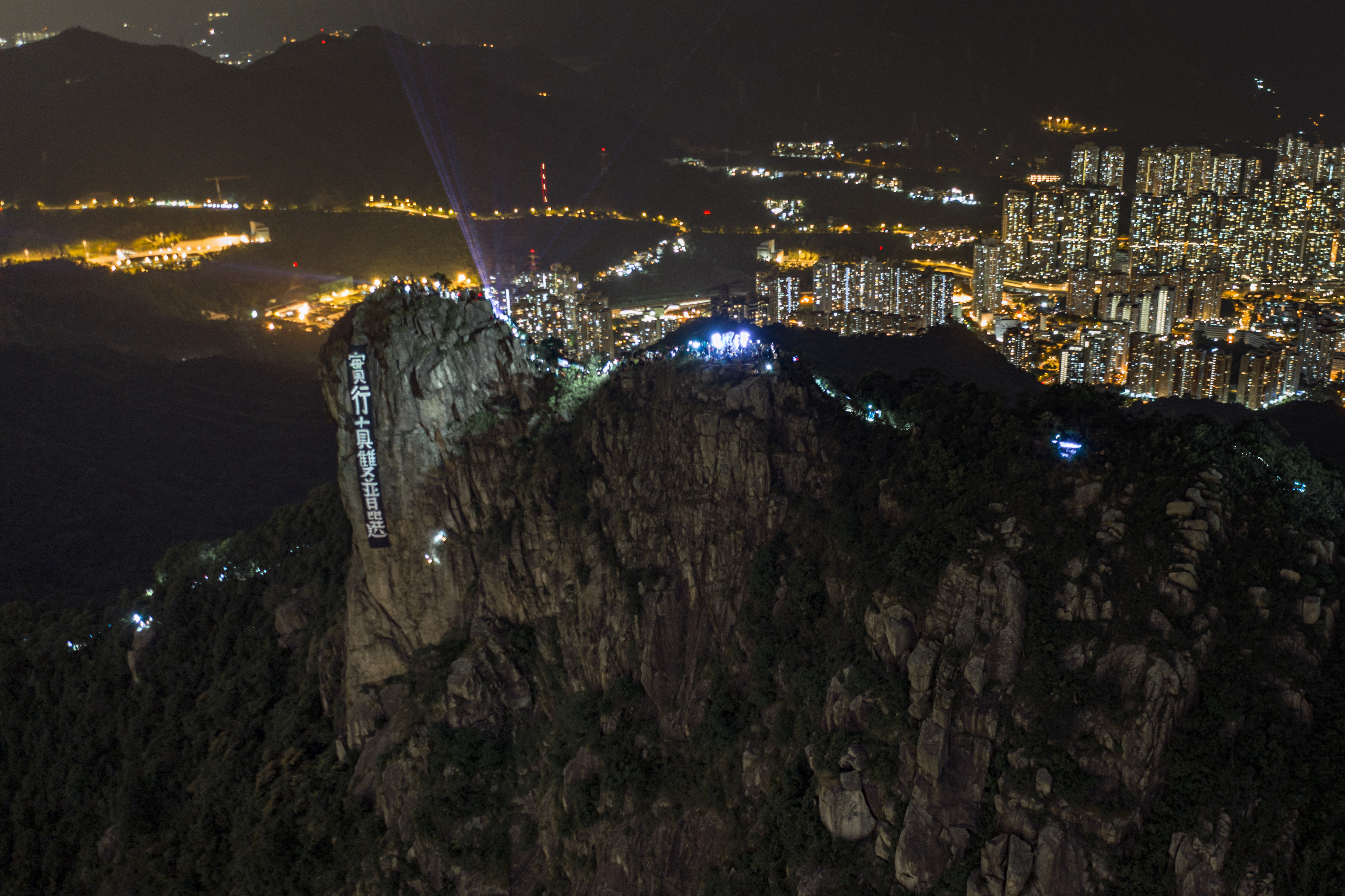 2019-09-13 Lion Rock, Hong Kong